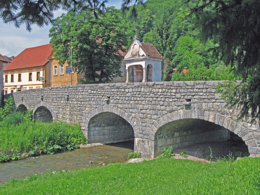 Mirna Slo. Bogenbrücke 18. Jahrh.